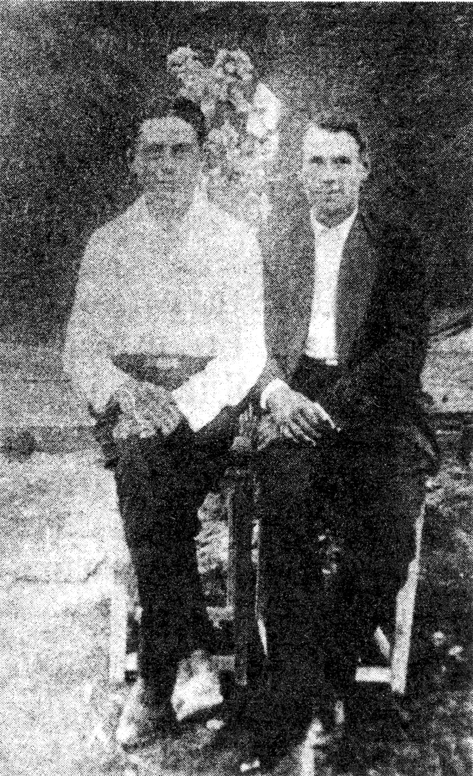 Беларуская (тарашкевіца): Ссыльны здымак Вацлава Лявіцкага (справа) з дарчым надпісам па-беларуску: На памяць даражэнькай мамачцы і сястрыцы ад В. Лявіцкага. 38 года X. 26